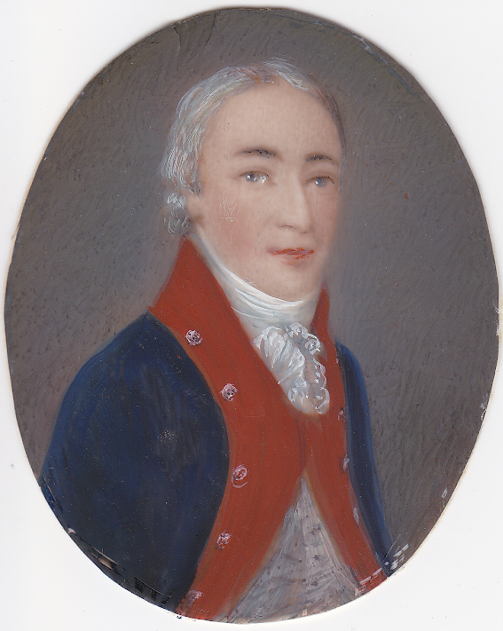 August Maximilian von Freyhold, Königlich Preußischer Hauptmann a.D., Porzellanmalerei um 1810.